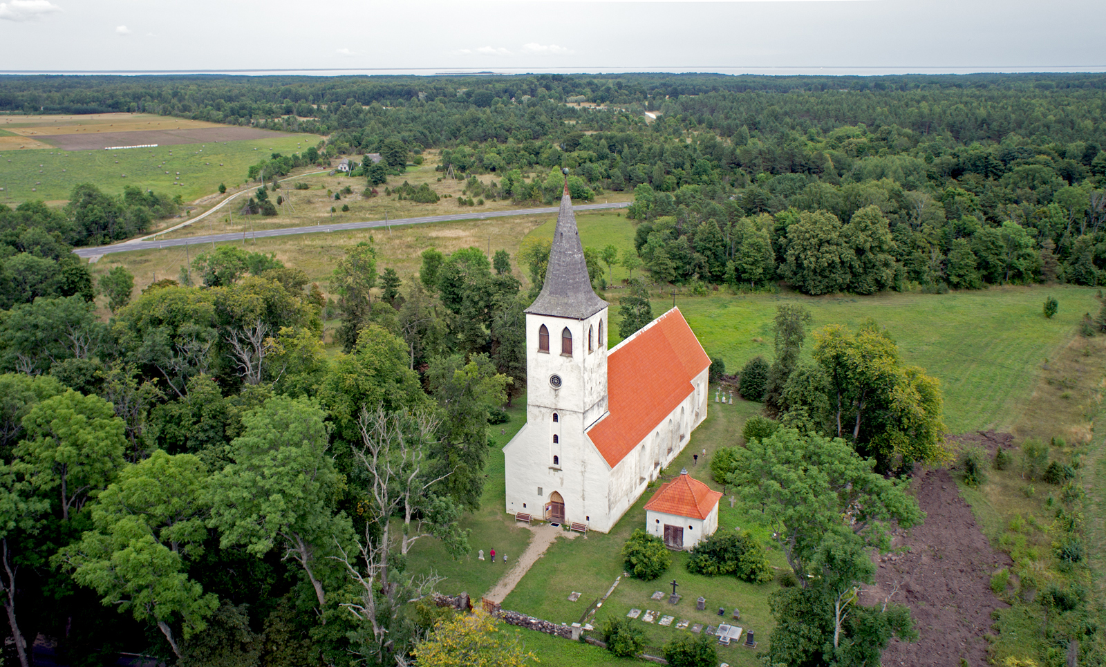 Pühalepa kirik. Vaade ülevalt